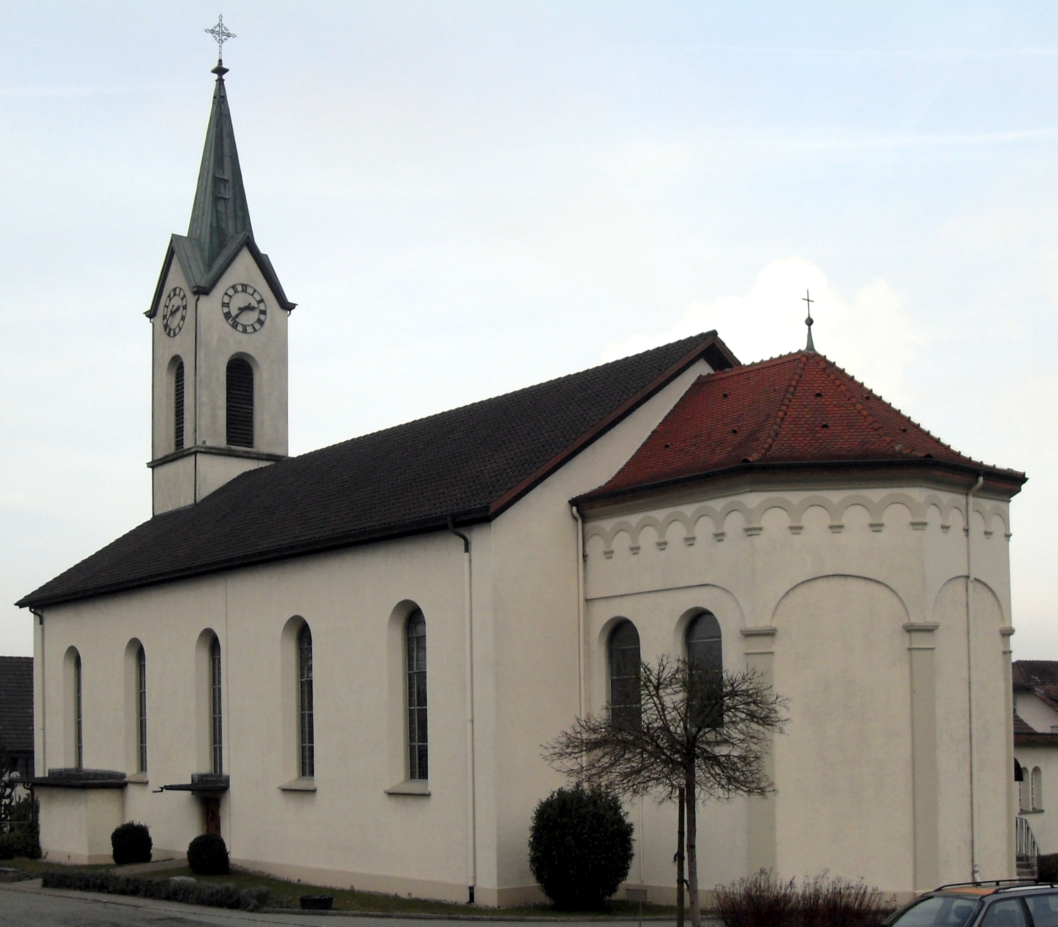 Südwestseite der Pfarrkirche St. Fridolin in Leibstadt, Kanton Aargau, Schweiz